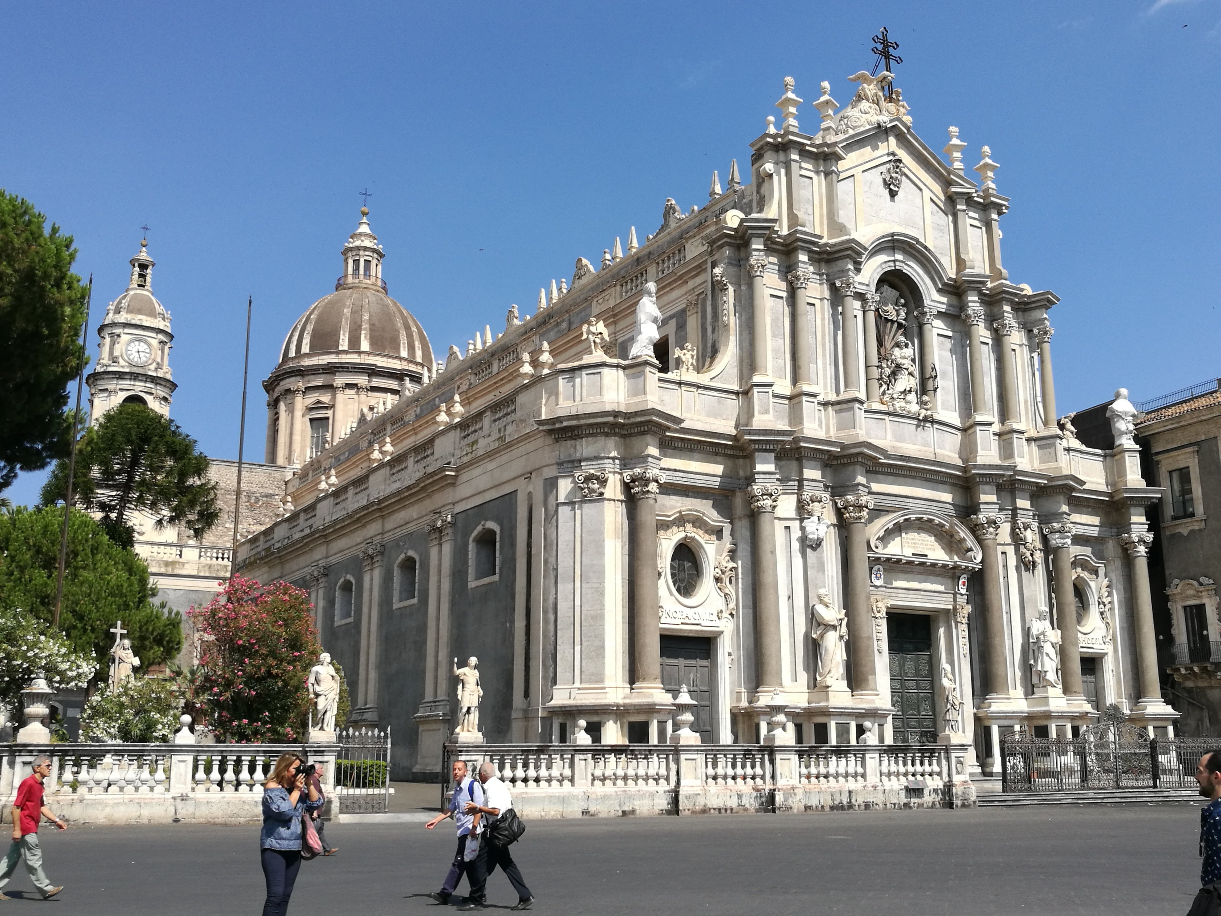 Vue de la façade de la Cathédrale Sant'Agata, a Catane (Sicile, Italie)